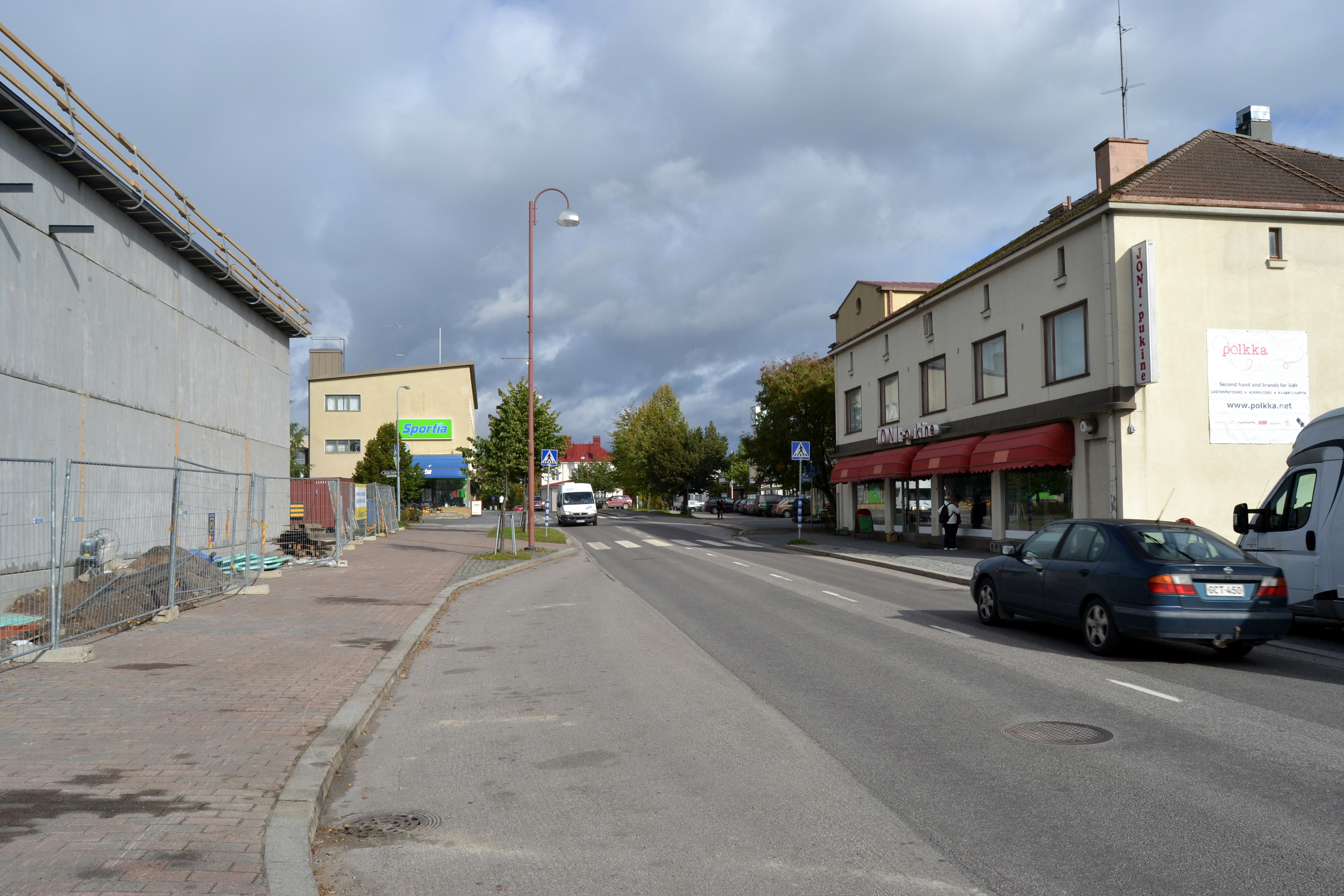 Oriveden keskustaa. Vasemmalla näkyy uuden Prisma-tavaratalon rakennustyöt.